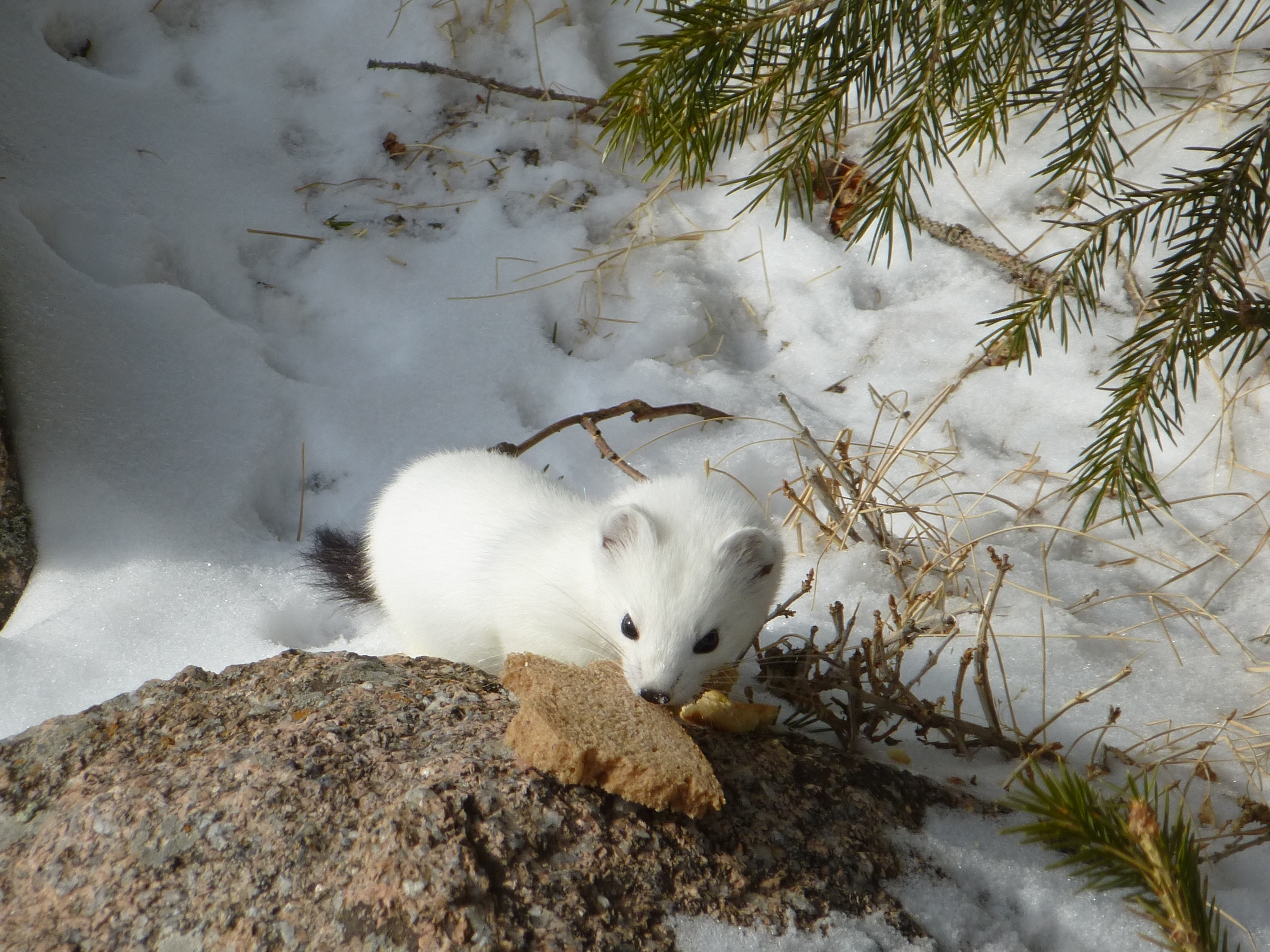 Прикормленный туристами горностай поедает чёрный хлеб. Снято в Заилийском Алатау.